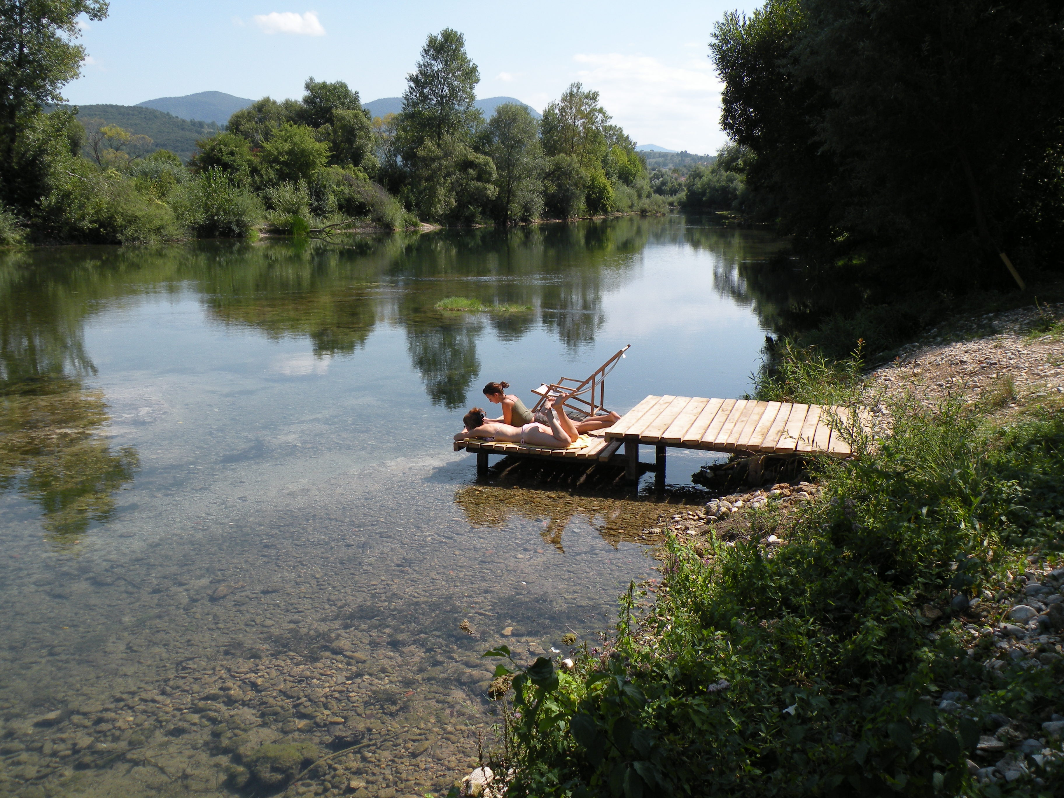 blue silence 3